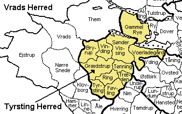 Tyrsting Herred, Skanderborg Amt, Denmark Source: Map by Svend-Erik Christiansen